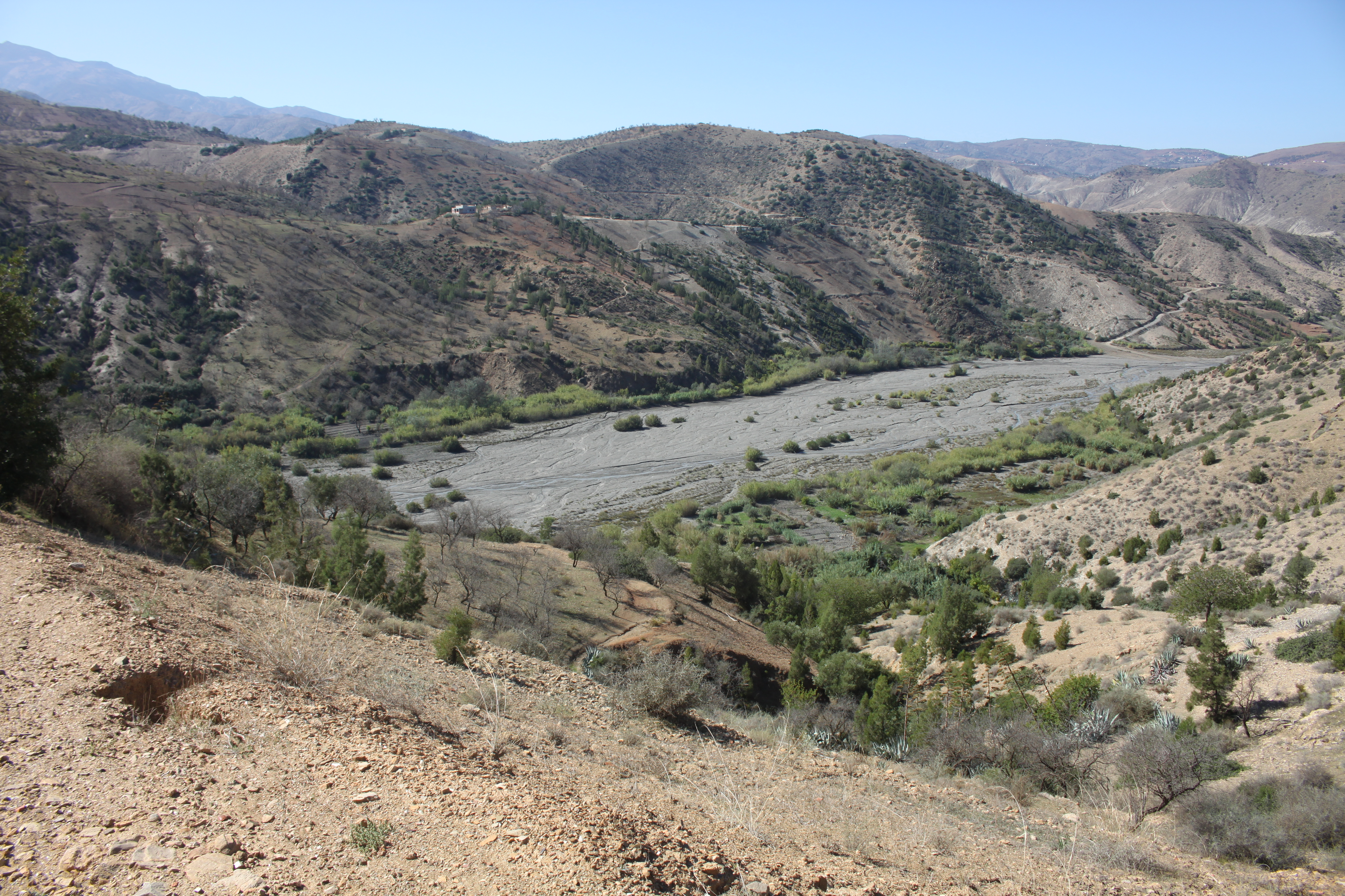 Dieses Bild entstand im Rif Gebierge nähe Al Hoceima - Imzouren - Aghrid